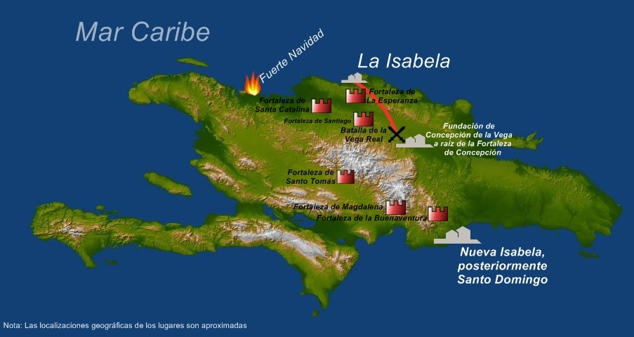 Esquema de los acontecimientos más importantes de la Conquista de La Española de 1492 a 1494, realizada por el Almirante Cristóbal Colón. Se muestra el lugar de la Fortaleza de Santo Tomás, atacada por Caonabo, y las demás en base a este mapa, y el mapa sobre el que están situados los datos es de la NASA. Se muestran acontecimientos como la Batalla de la Vega Real.